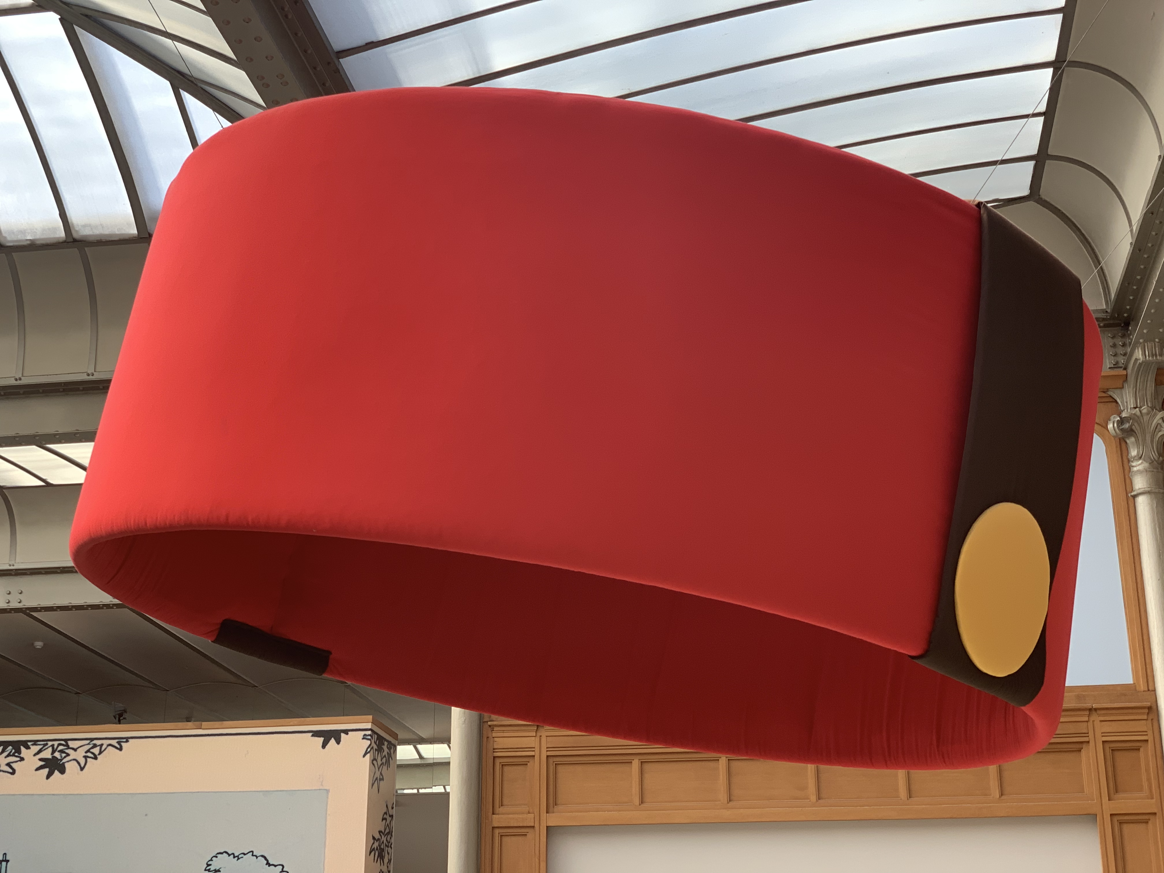 Le chapeau géant de Spirou exposé au centre belge de la BD.